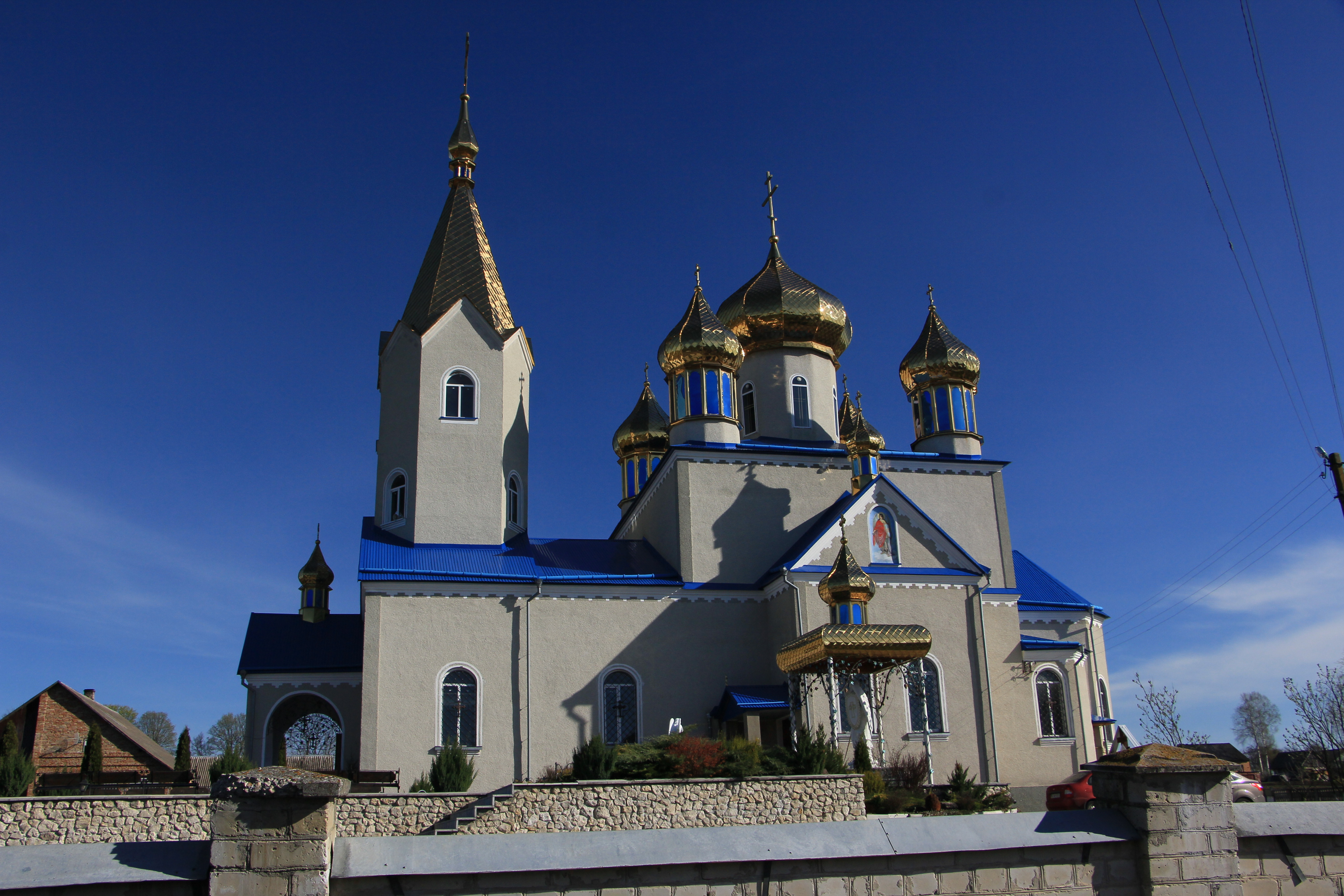 Церква в селі Горинка Кременецького району Тернопільської області